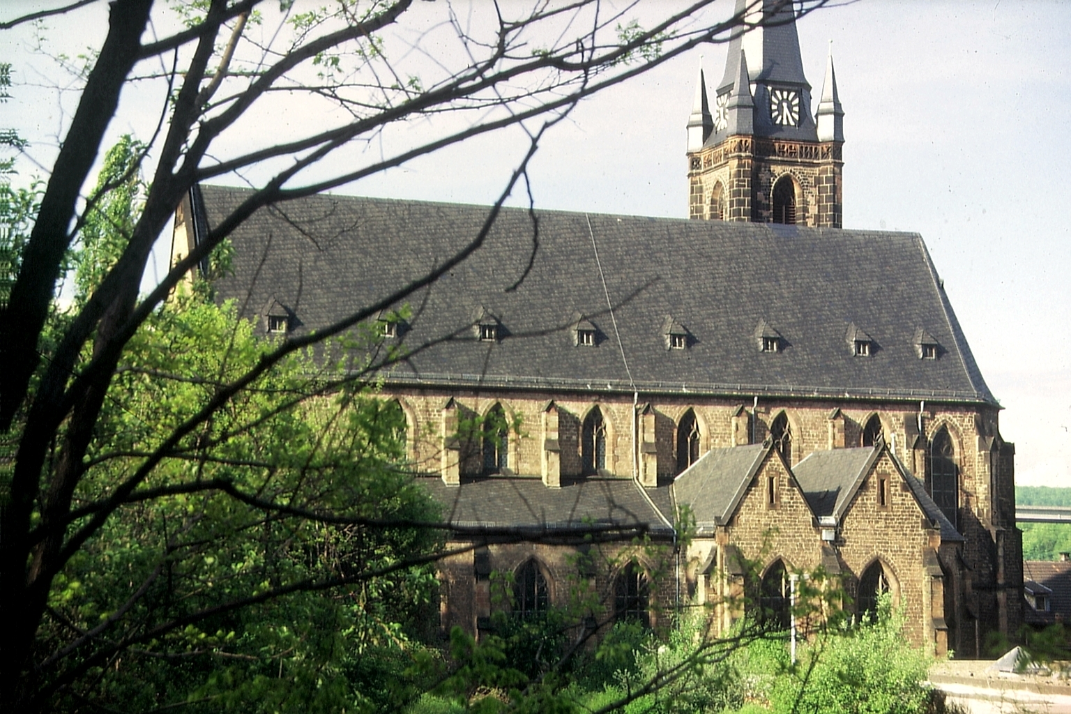 kath. Kirche Altenwald